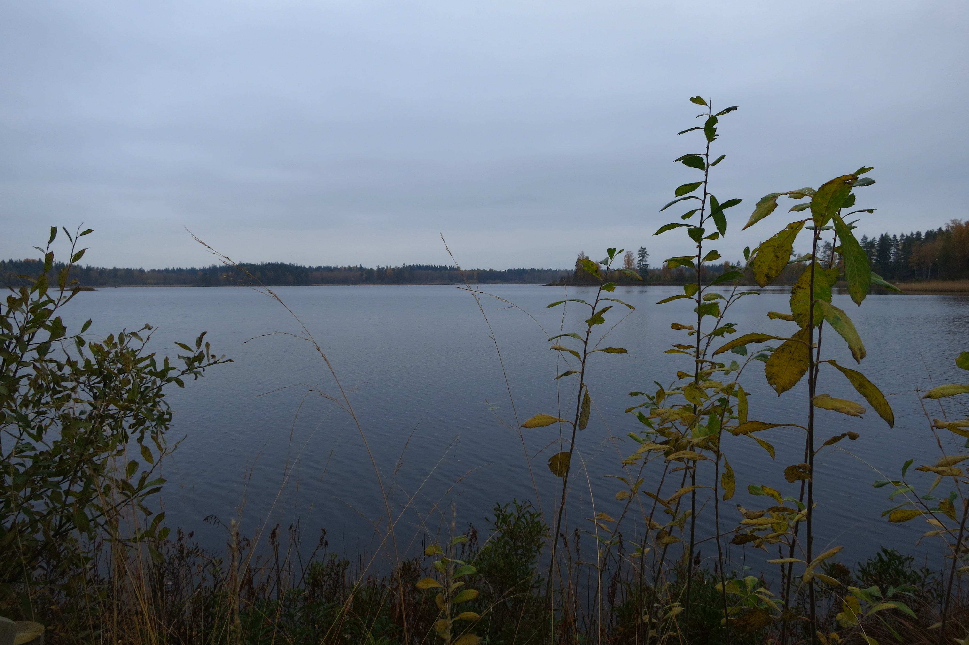 Sjön Vikholmen, Tingsryds kommun